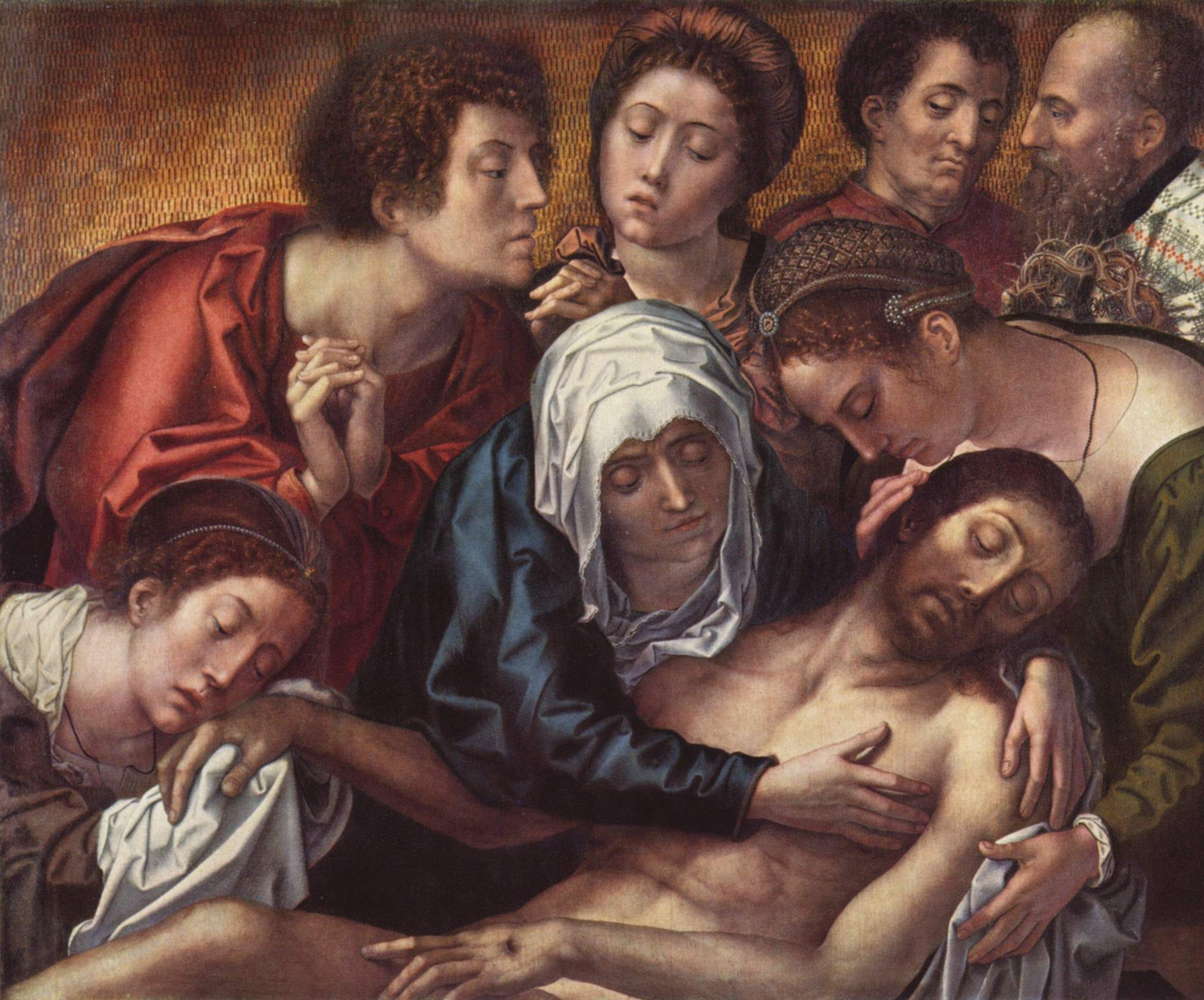 Triptychon des Philippe de Haneton, Mitteltafel